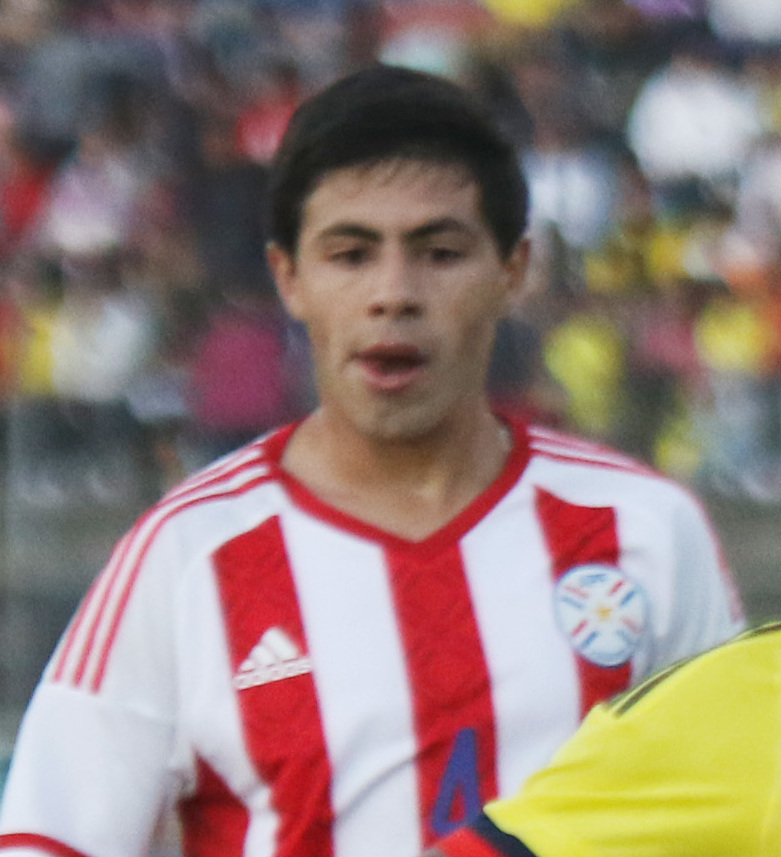 Riobamba, Ecuador, 18 enero 2017 (Andes).- Las selecciones nacionales de Paraguay y Colombia igualaron 1-1 este miércoles en el estadio Olímpico de Riobamba (centro andino) en el inicio del Campeonato Sudamericano Sub 20 Ecuador 2017. ANDES/Micaela Ayala V.